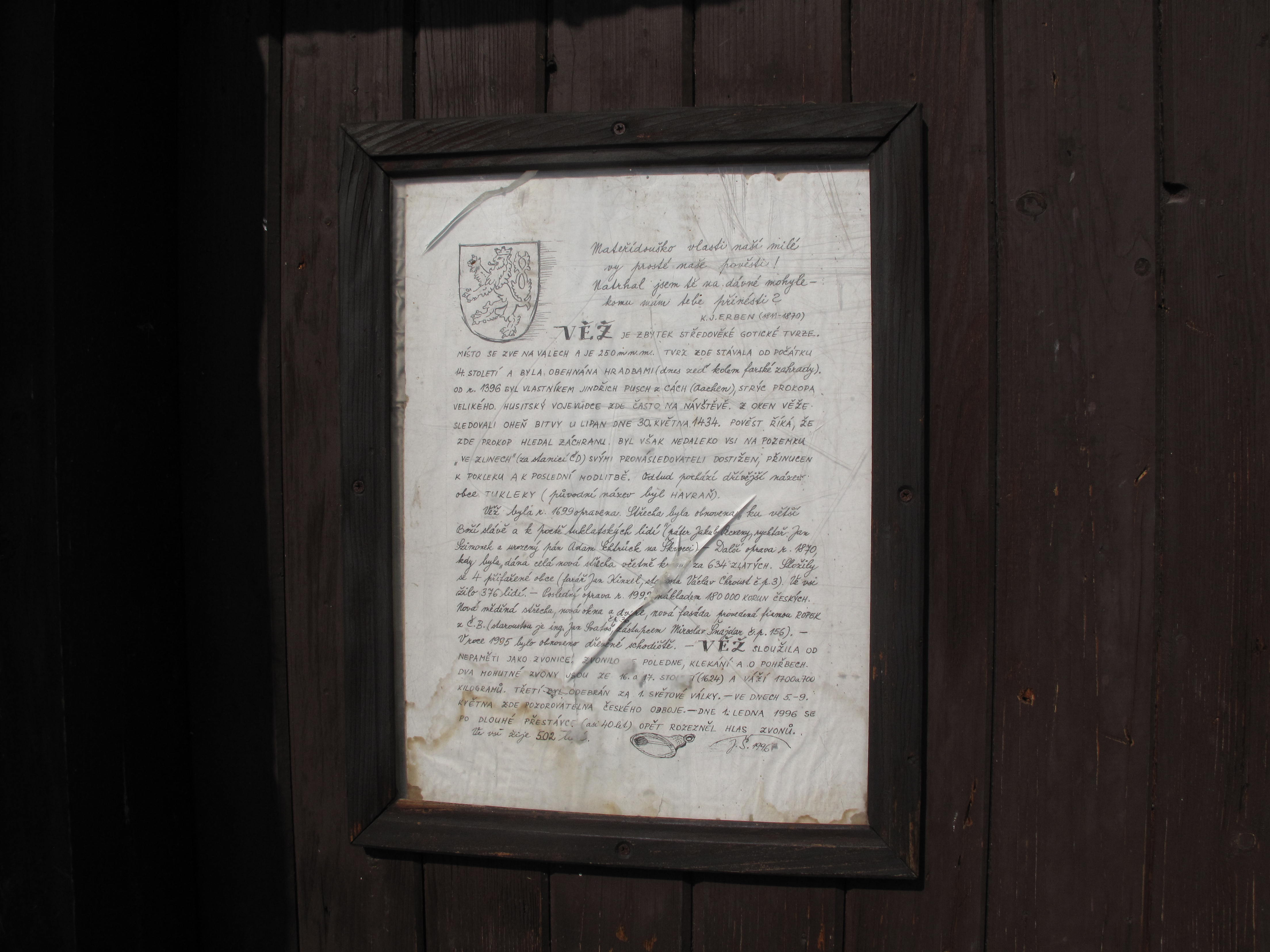 Tuklaty